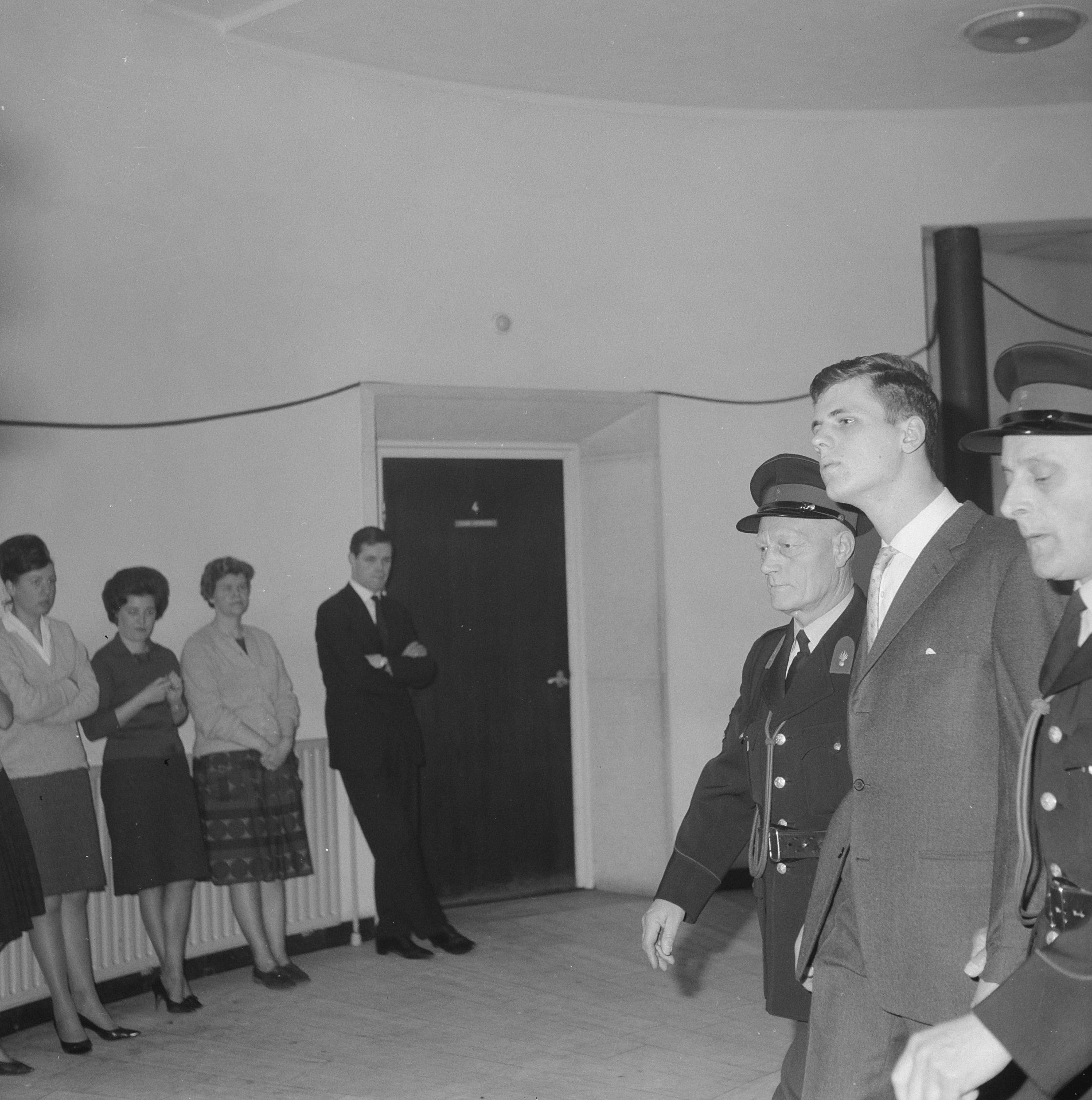 Behandeling moordzaak Baarn. Boudewijn Henny op weg naar de rechtszaal